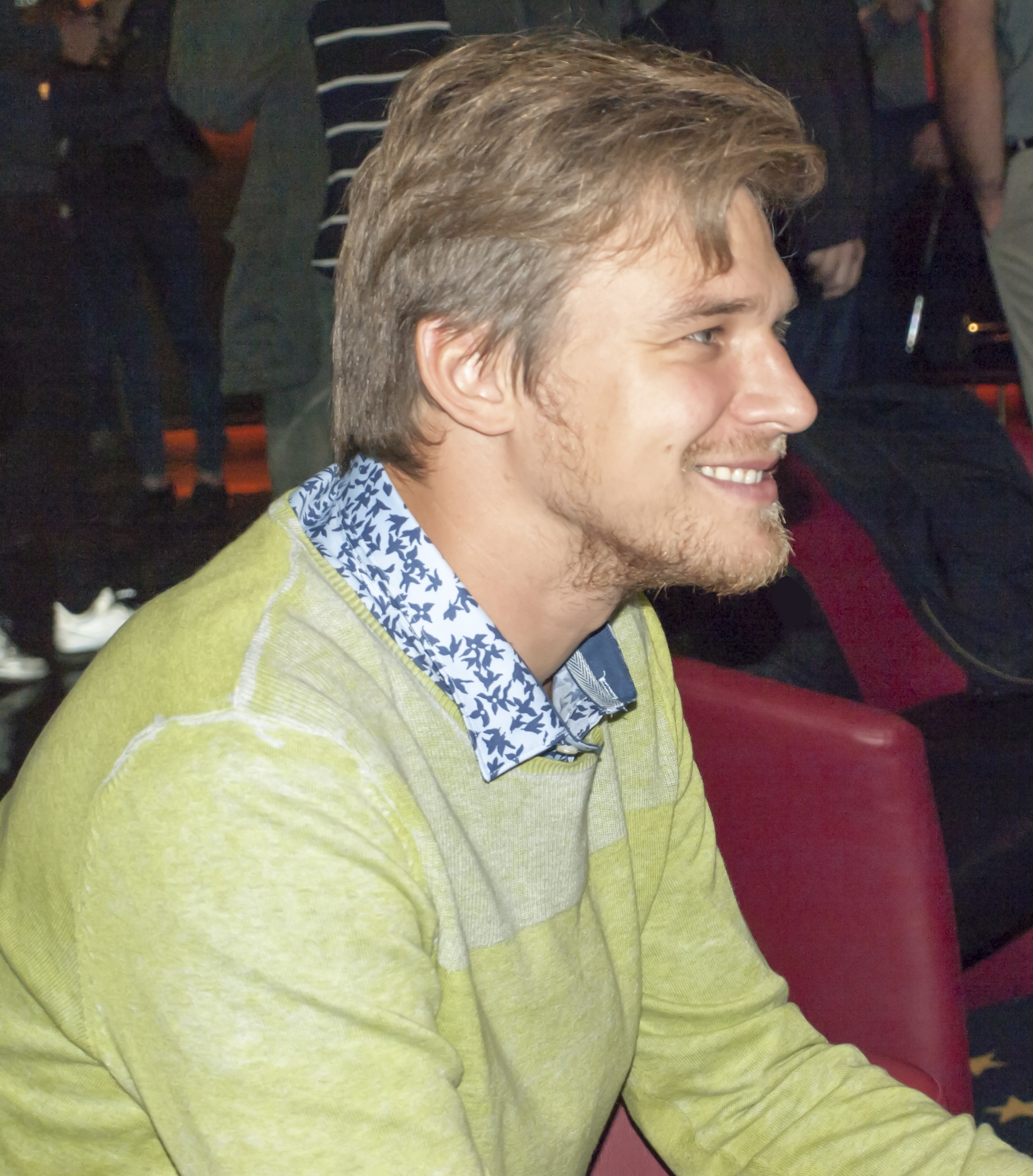 Fotky z novinářské konference 15.9.2015. Autor: Blanka Borová (Karolína Černá) pro Kritiky.cz & [ 10Mpix.cz